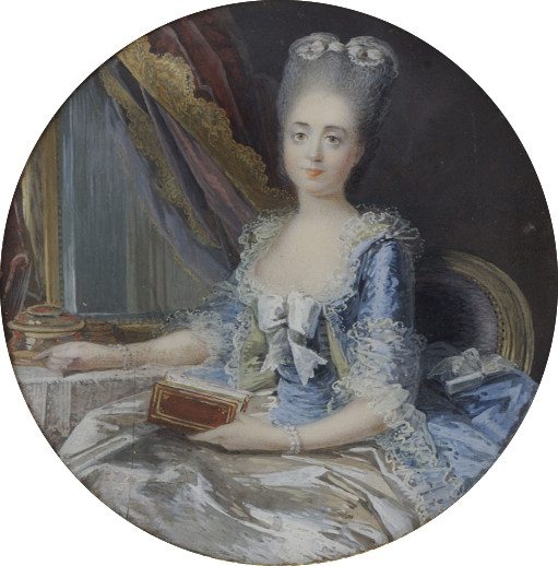 Portrait de la duchesse de Fitz-James à sa toilette